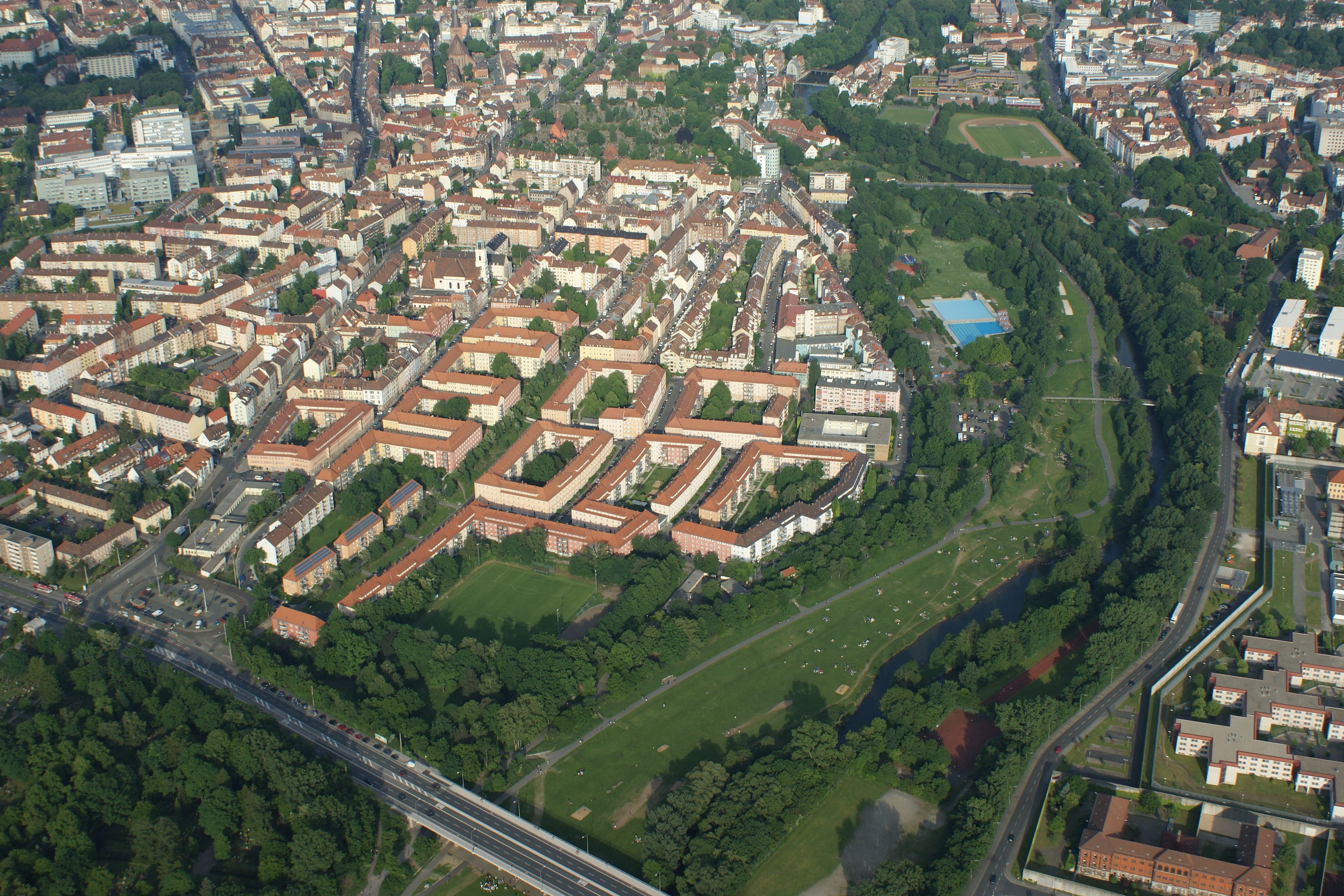 Luftaufnahme von St. Johannis am 25.05.2008